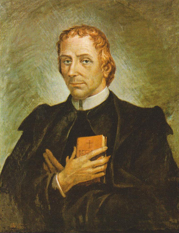 Seliger Carlo Steeb (Ölgemälde)